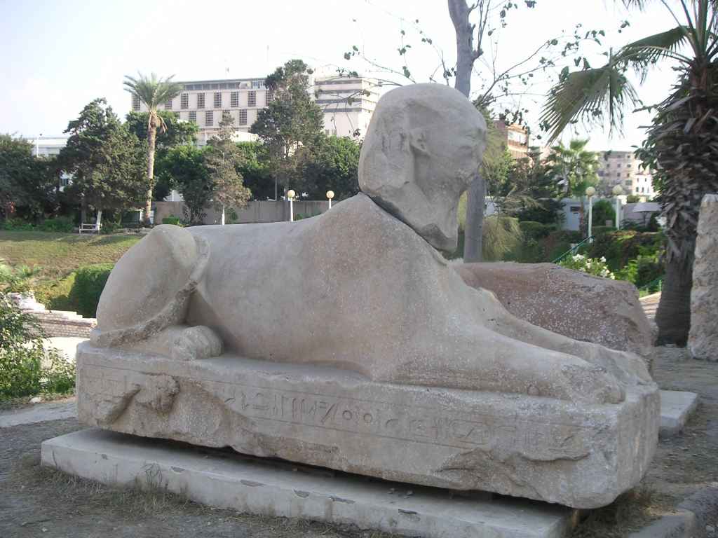 Sphinx colossal de Psammétique II provenant d'Héliopolis et retrouvé à Alexandrie - XXVIe dynastie égyptienne